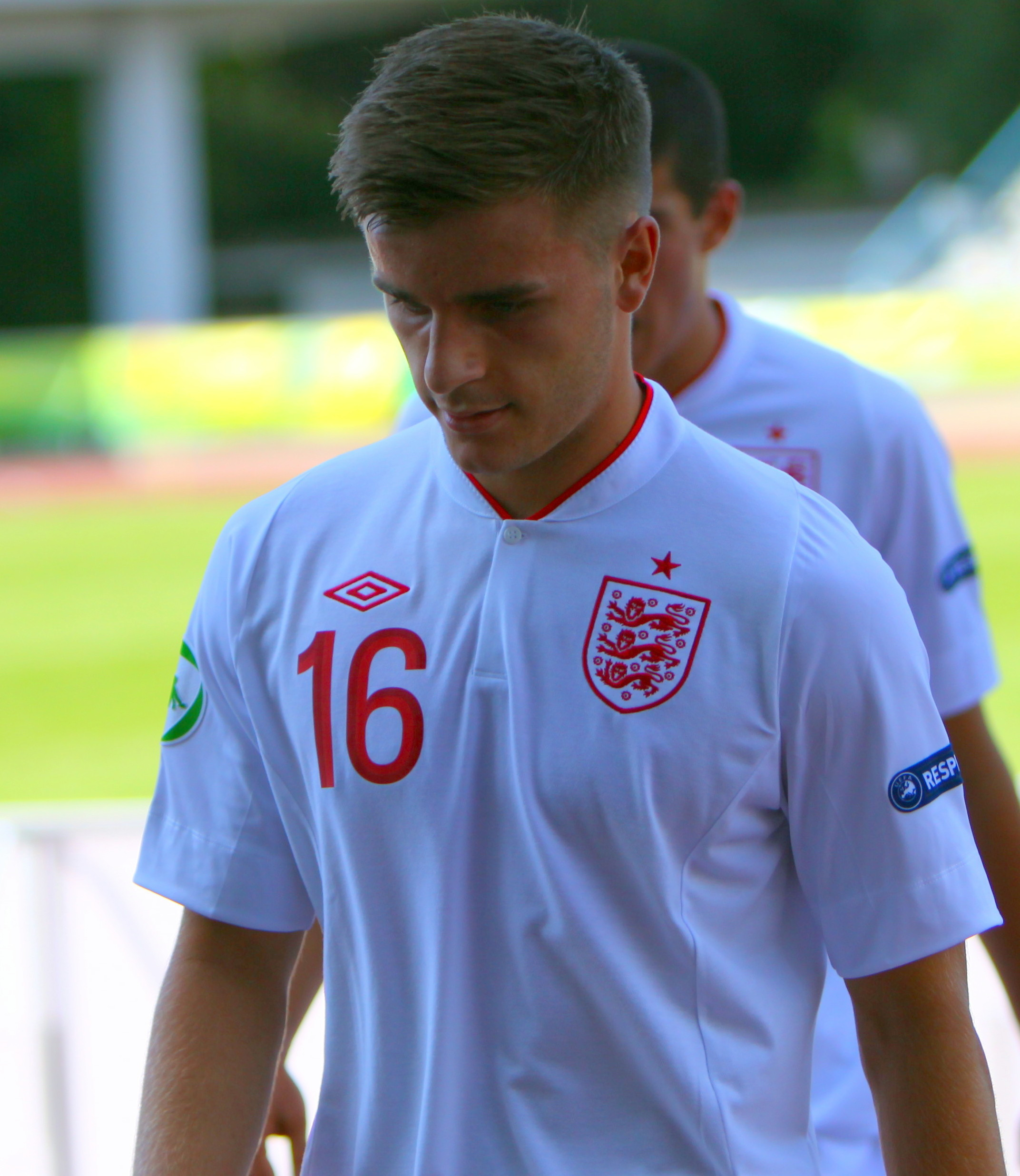 Luke Garbutt